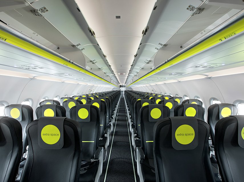 La cabina con i nuovi interni dell'Airbus A320NEO